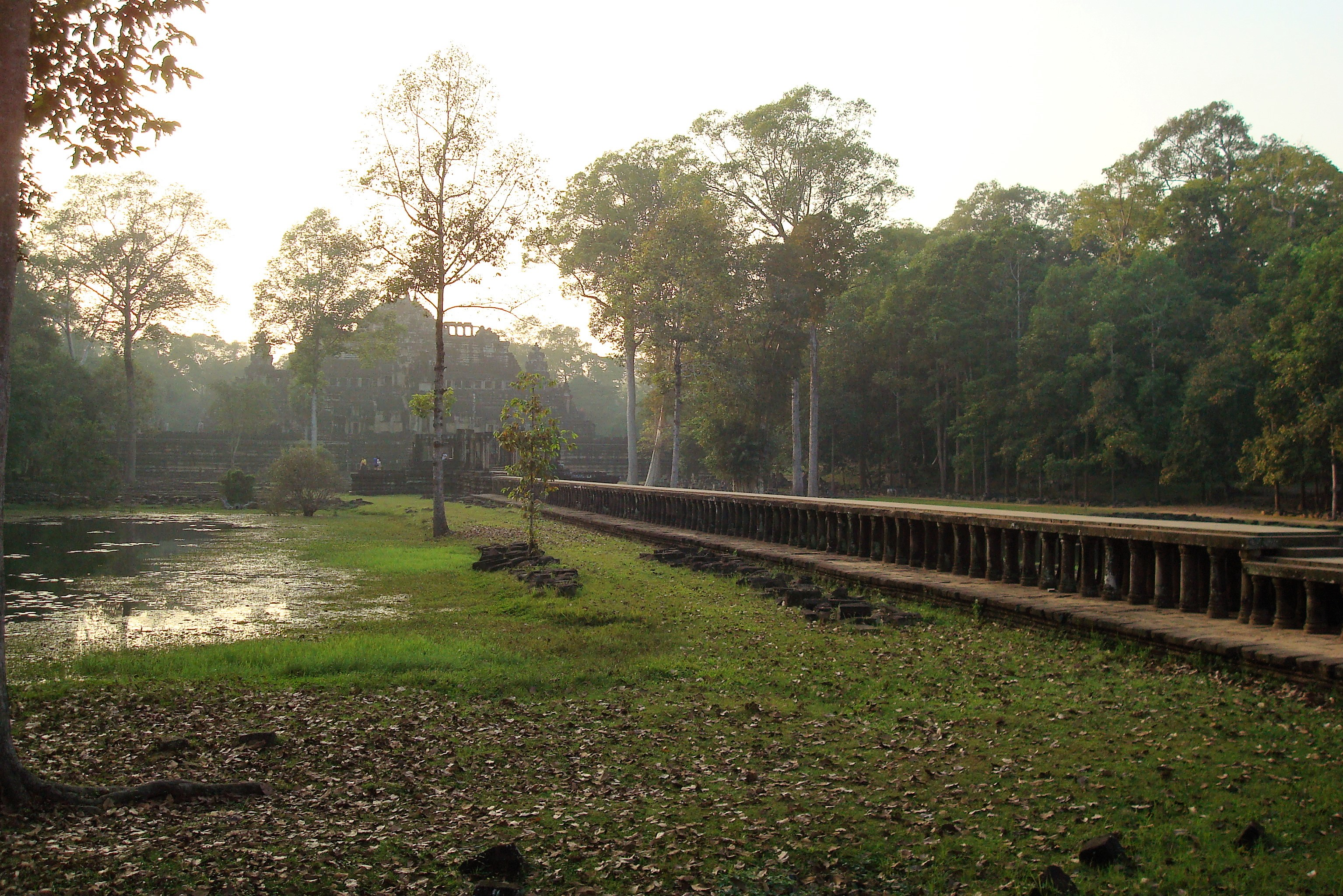 Baphuon mit Zugangsdamm